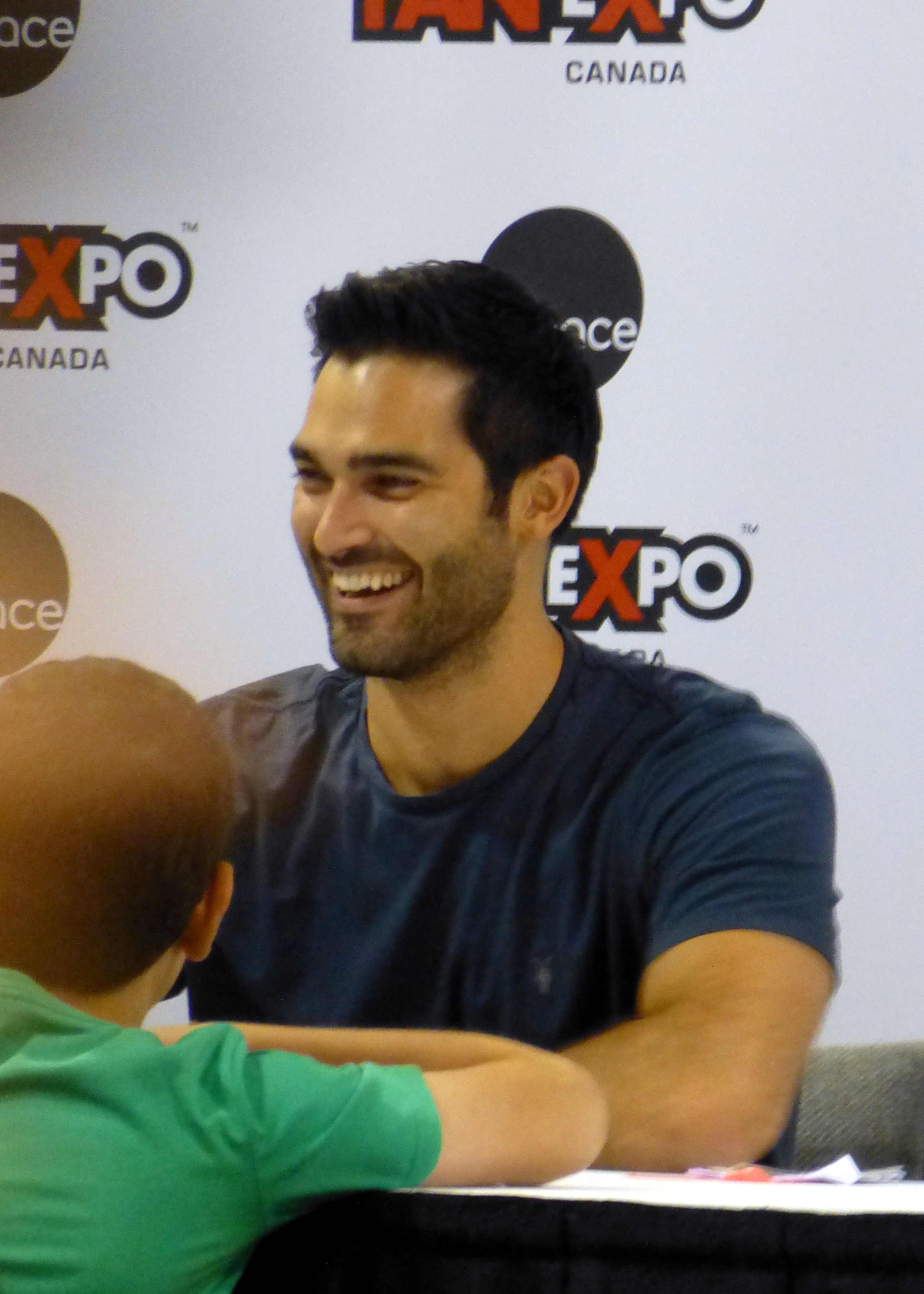 Tyler Hoechlin 02